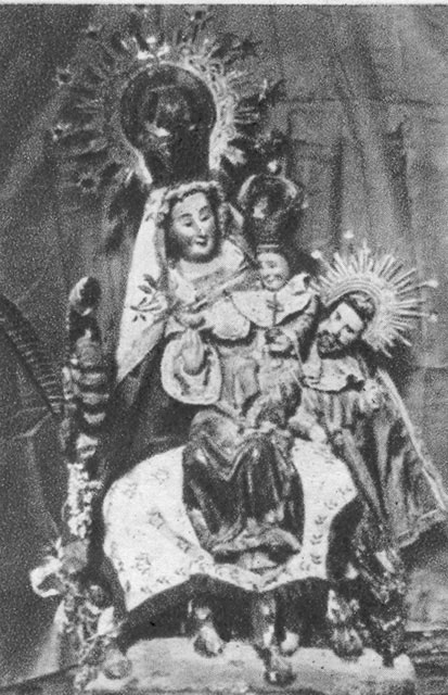 La Virgen de Revilla - Baltanás (Palencia) - España Turística y Monumental / Cuarto álbum / Las Bellezas de Castilla / Región Leonesa - Cromo 50 x 70 Sepia